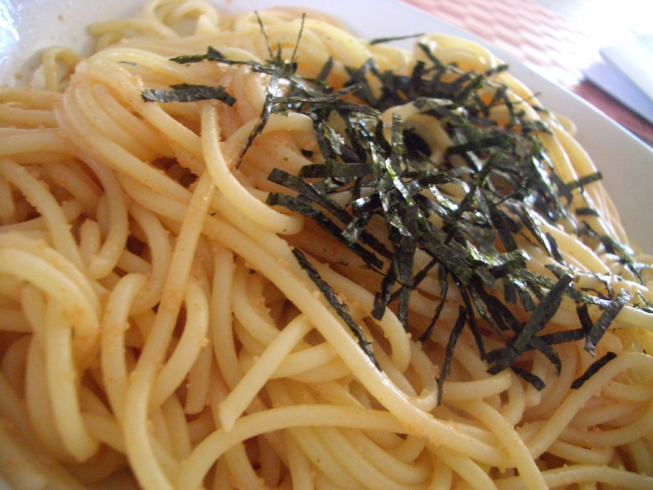 ウマー。